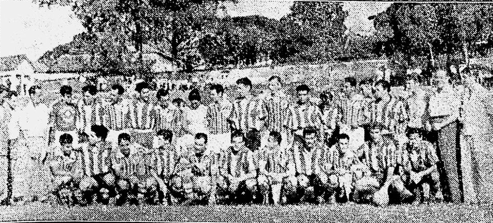 Formación de los equipos de Olímpica de Lavras (Brasil) y Rosario Central (Argentina), en cancha del primero, previo al partido del 14 de febrero de 1957 que ganaron los brasileños 2-1.